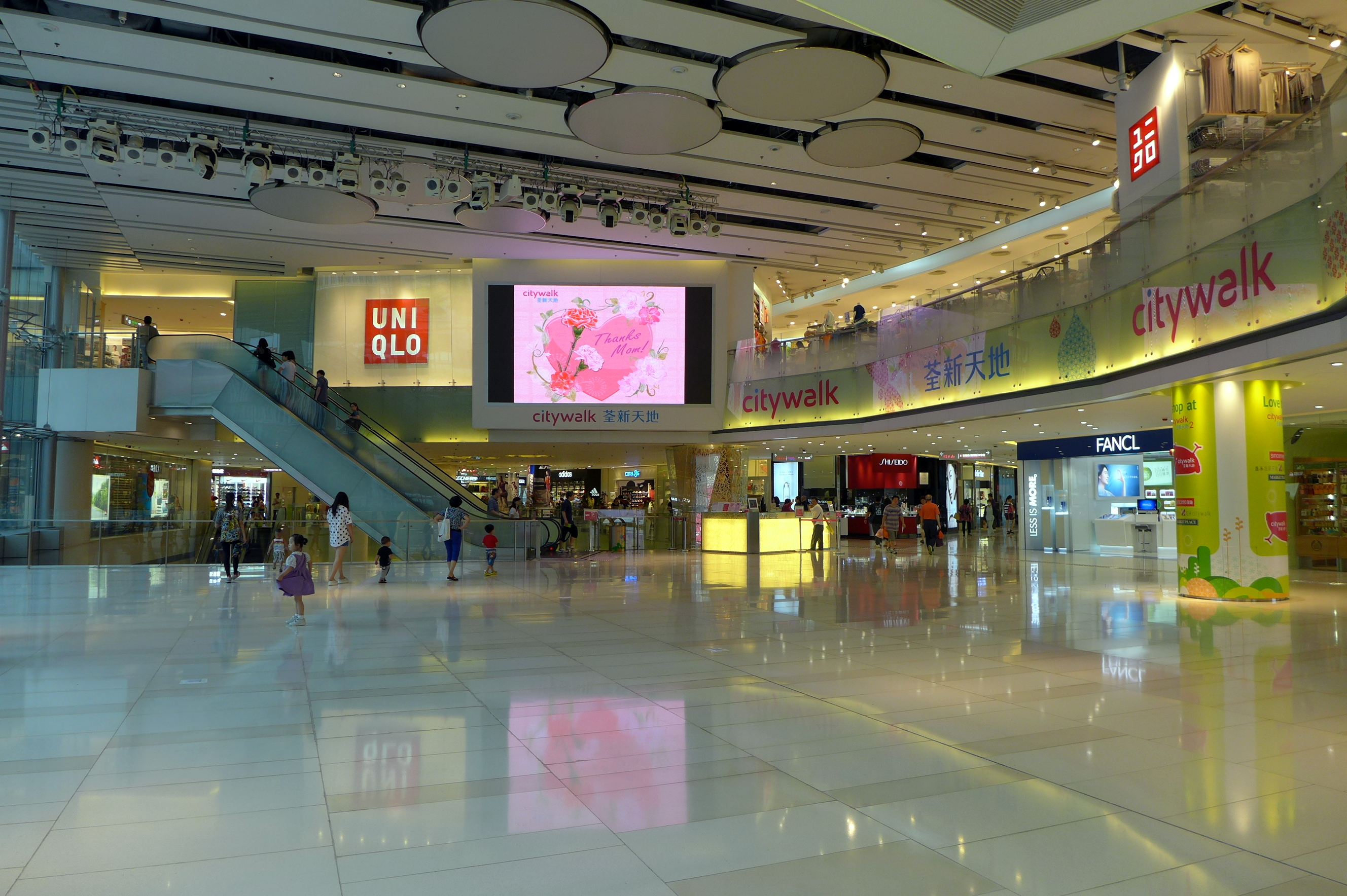 HK Citywalk Void